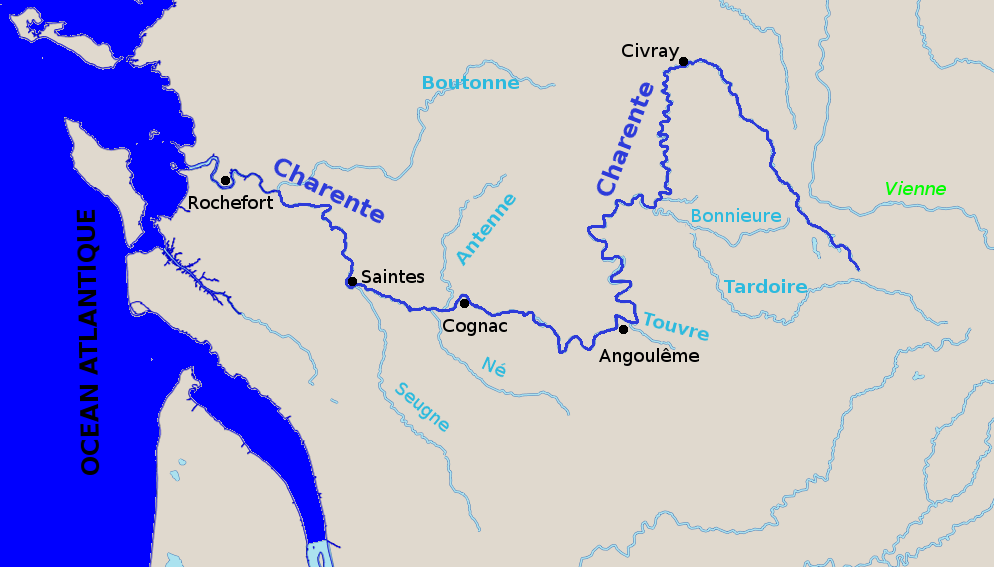 Cours du fleuve Charente avec ses affluents principaux